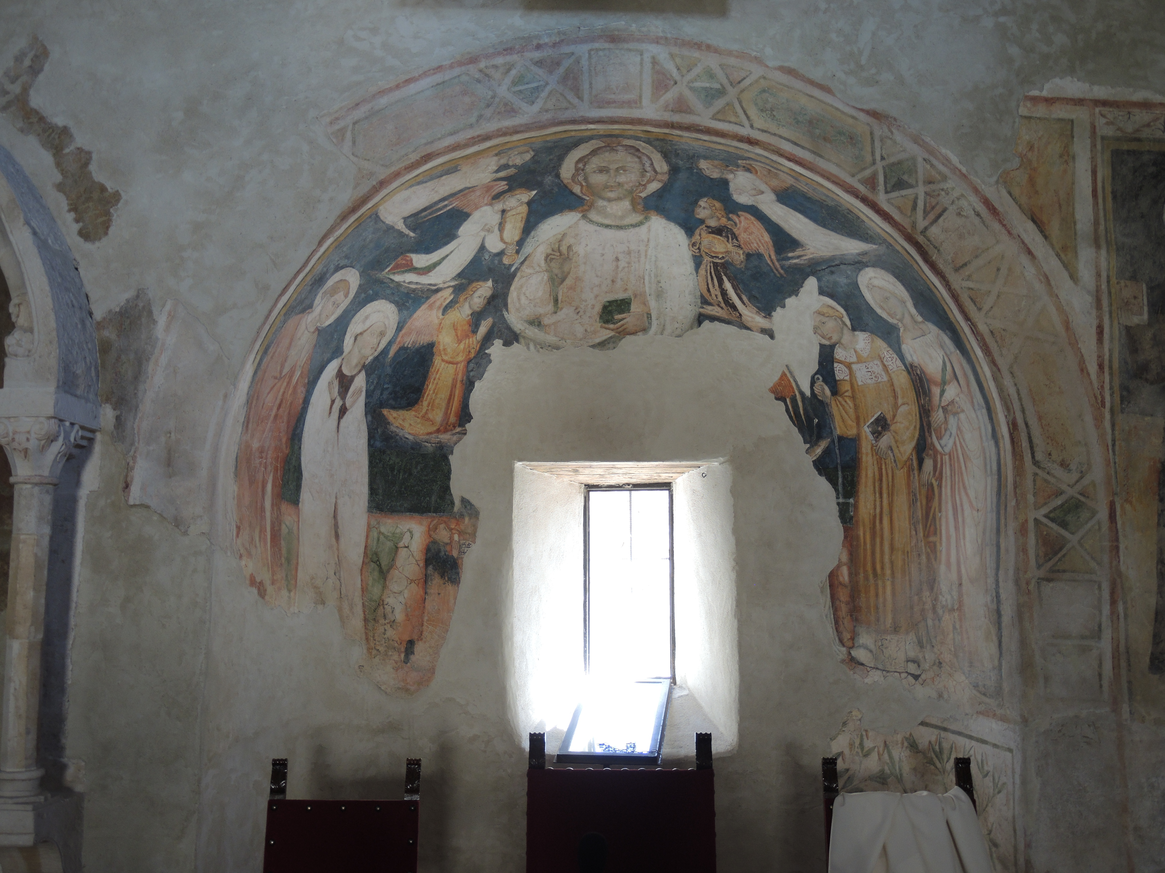 Navelli - Chiesa di Sant'Egidio